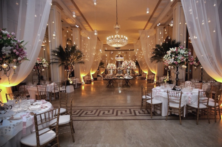 Copacabana Palace - Noble Room